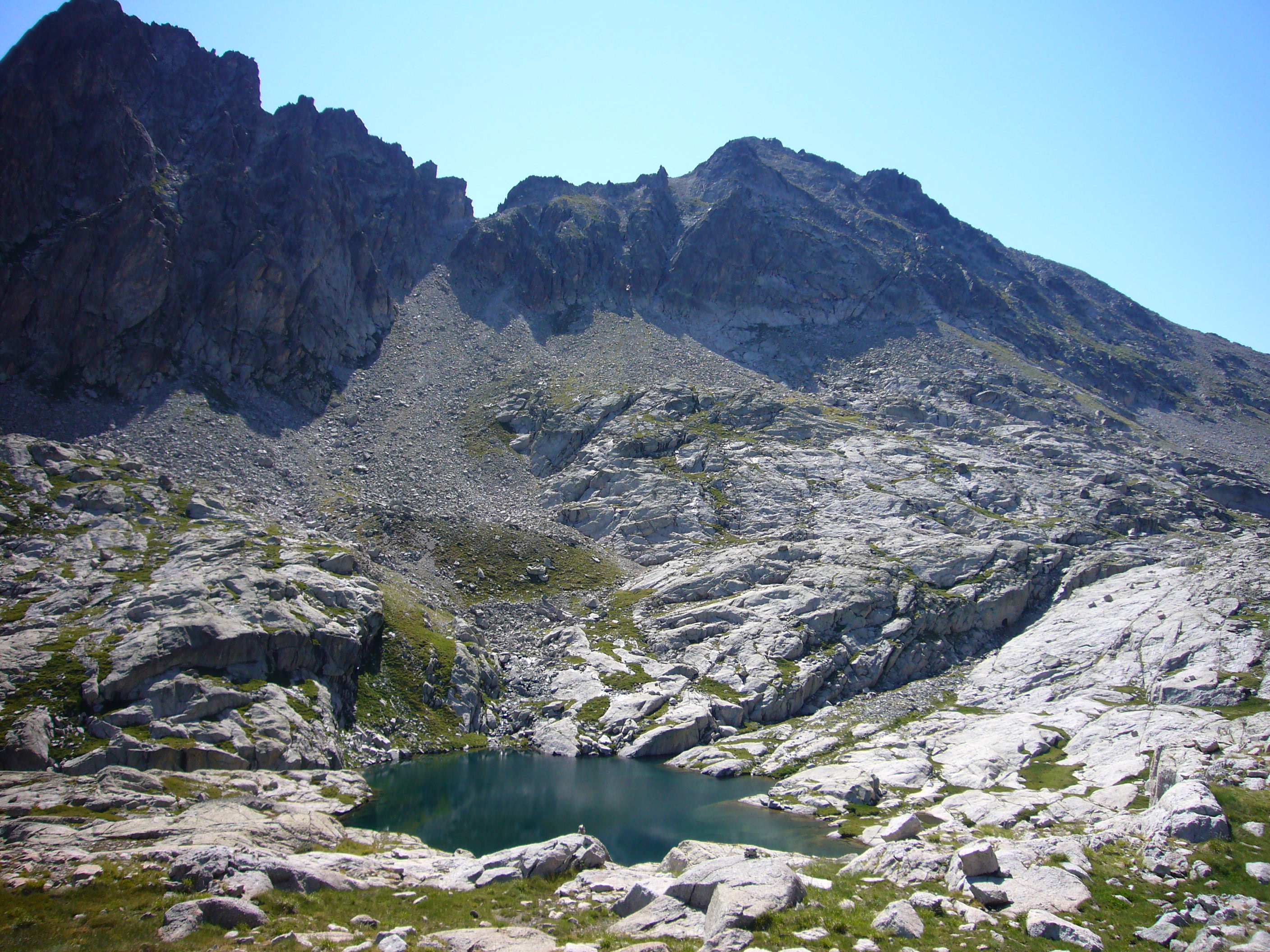 Pics i Coll Sud de Subenuix, vistos des de la Coma dels Pescadors; Espot, Pallars Sobirà, Catalunya